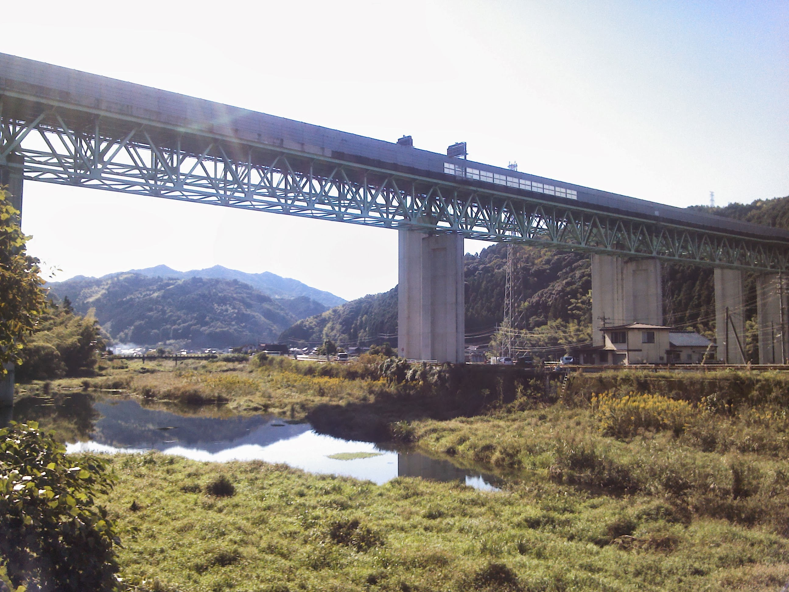 Misho, Iwakuni, Yamaguchi Prefecture 741-0083, Japan